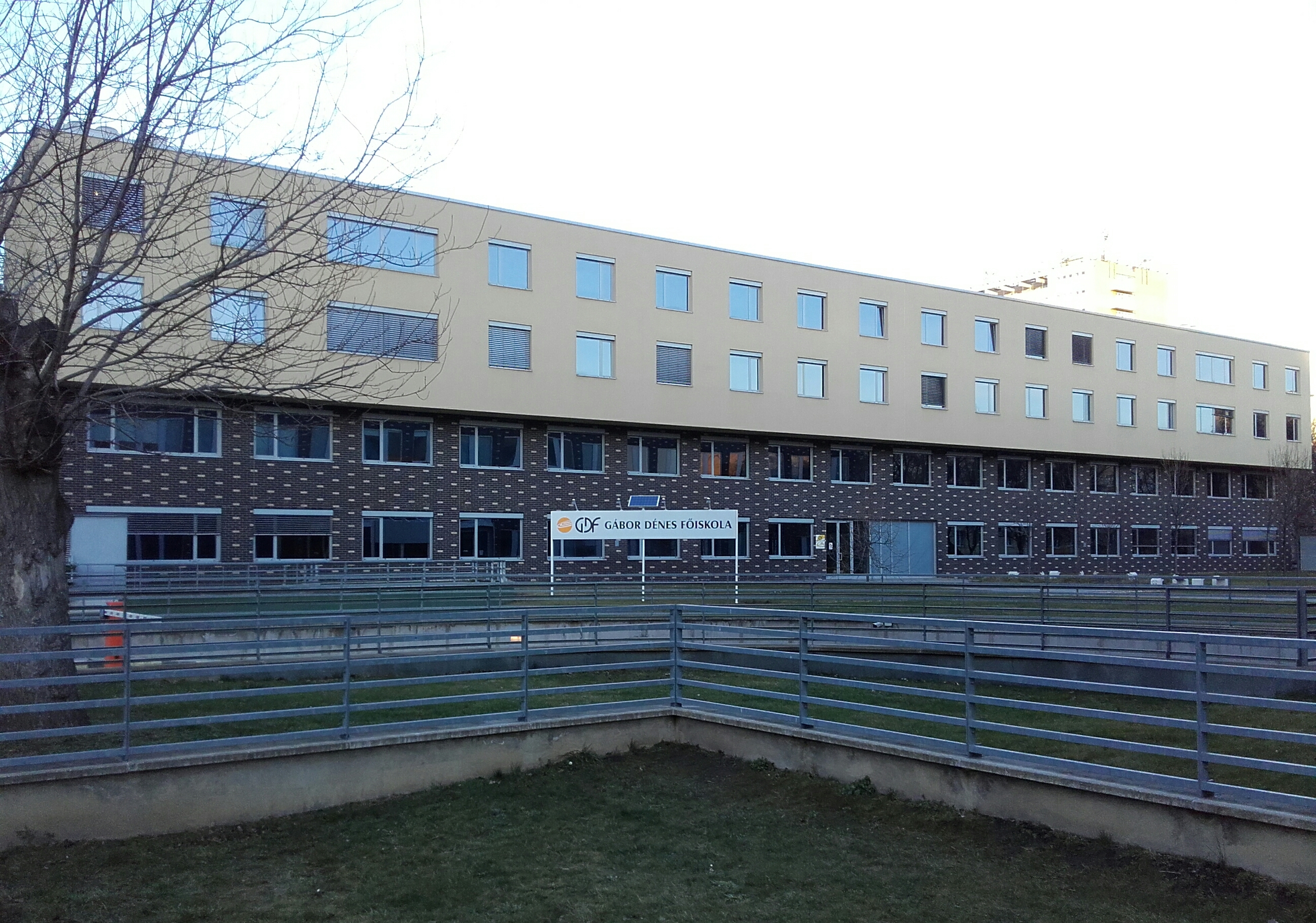 A Gábor Dénes Főiskola, Fejér Lipót utca 70. szám alatt található épülete 2018. január 20-án